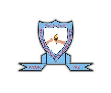 Escudo de la Institución Educativa Antonia Santos de Sincé, Sucre.